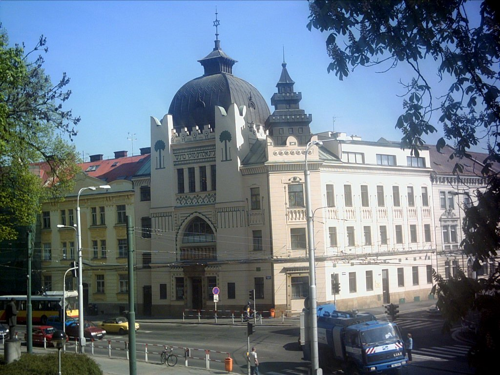 Hradec Králové, bývalá synagoga na nároží ulic Pospíšilova a Československé armády, později sídlo Studijní a vědecké knihovny.